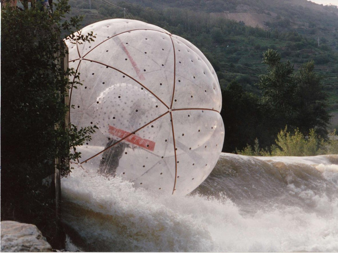 Innovación Mundial en uso de Horopo por aguas de rio